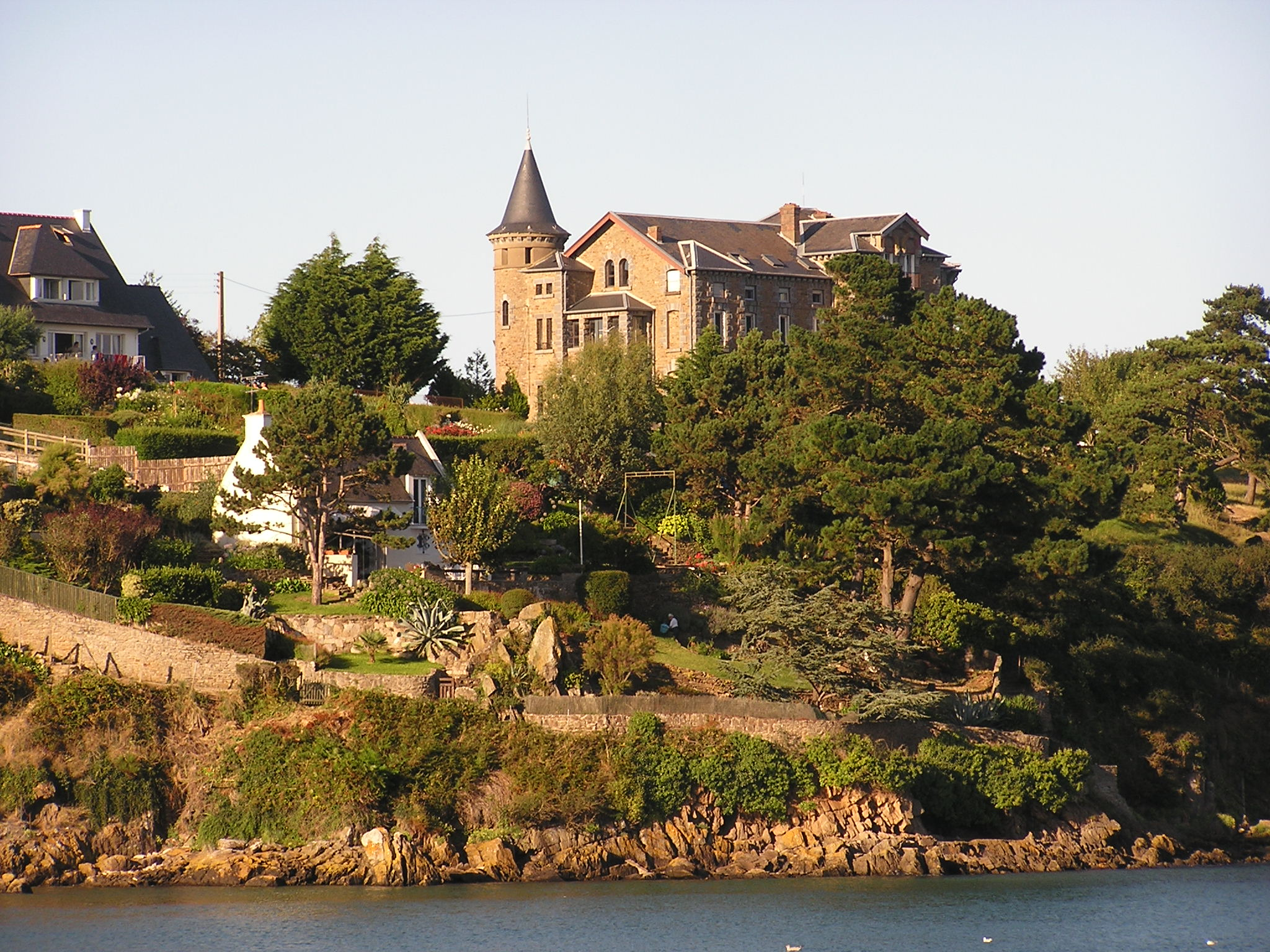 Castel de Barbe brulée à Cancale (35). .